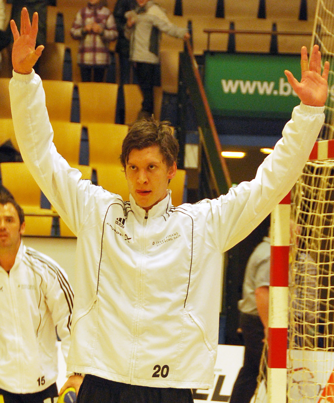 Den danske håndboldspiller Niklas Landin Jacobsen.